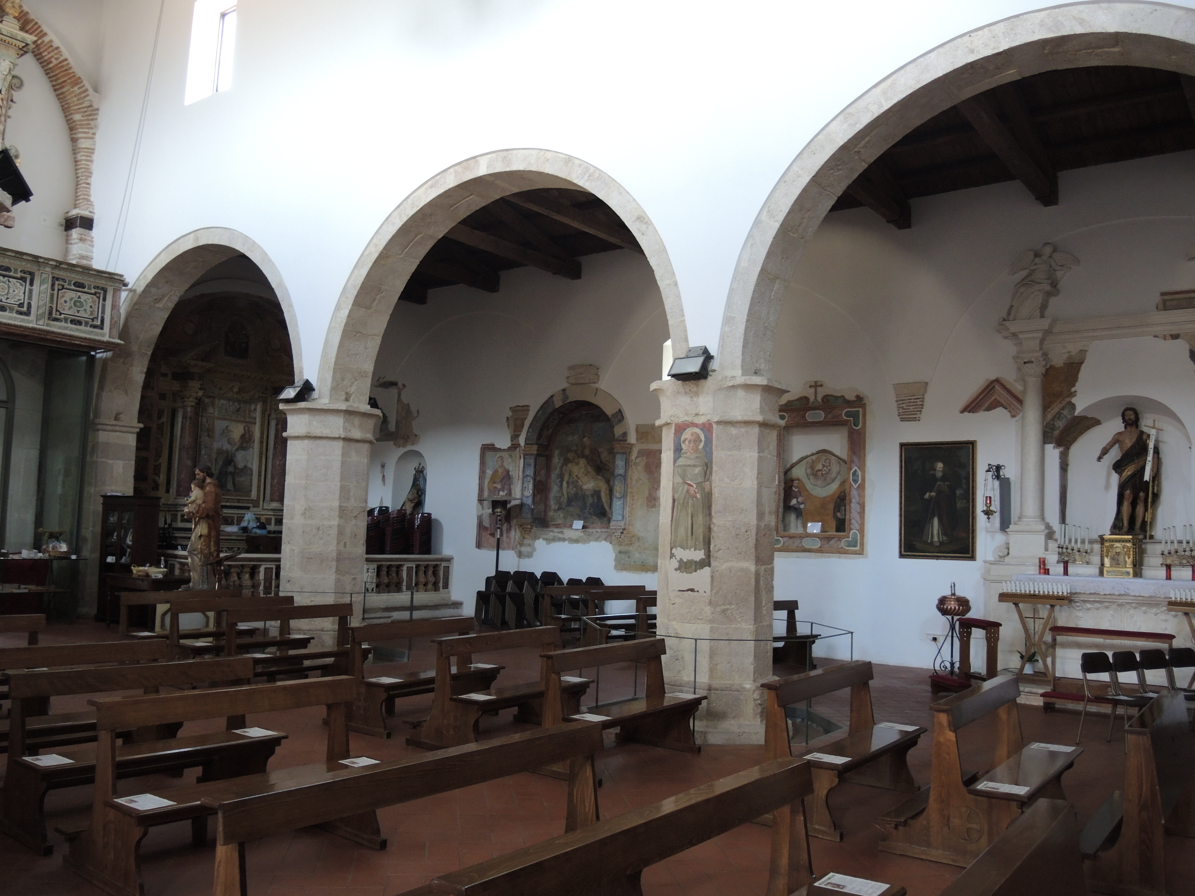 Lucoli: Abbazia di San Giovanni Battista